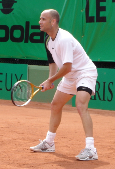 Andre Agassi au Trophée de Paris (Ruel-Malmaison) en 2005.